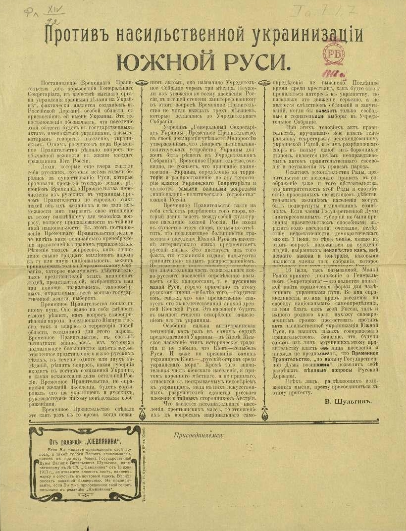 «Против насильственной украинизации Южной Руси» — протест члена Государственной думы Василия Витальевича Шульгина в газете «Киевлянин».